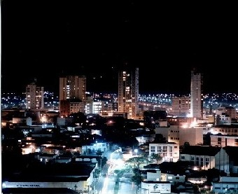 Vista noturna do centro de Anápolis